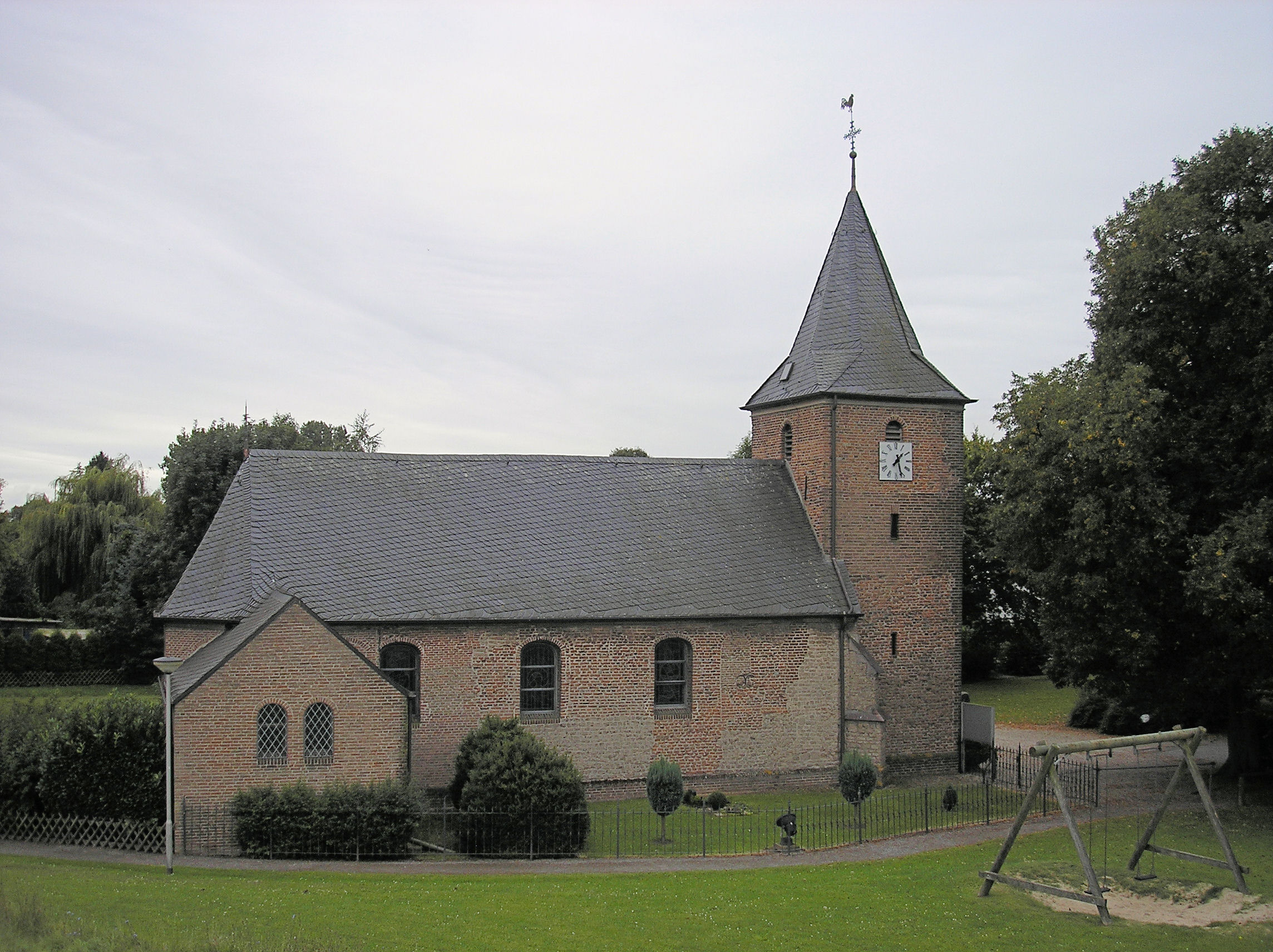 Die St. Martinus-Kirche in Bimmen, Stadt Kleve